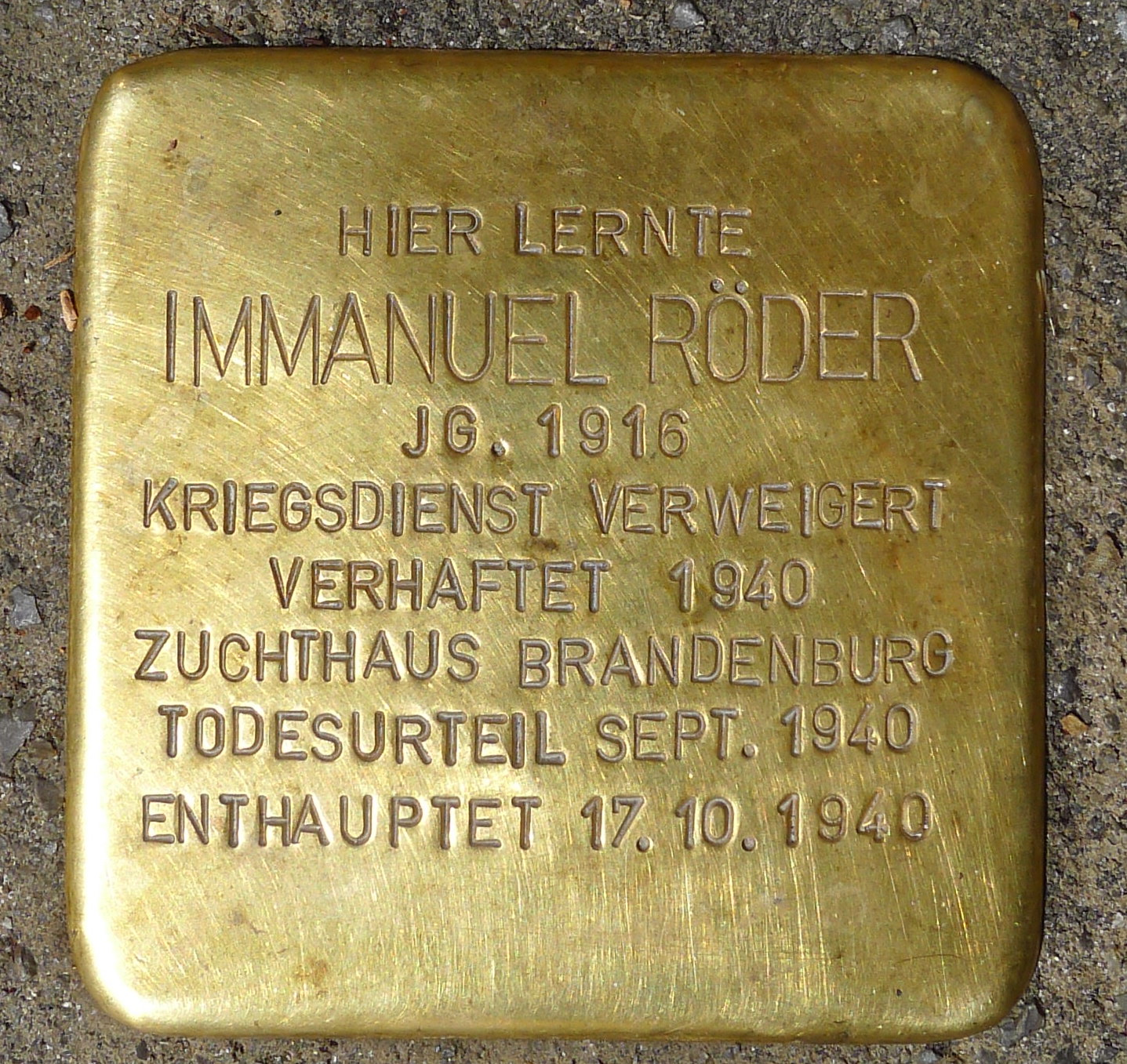 Stolperstein für Immanuel Röder, Korntal-Münchingen, Johannes-Daur-Straße 6